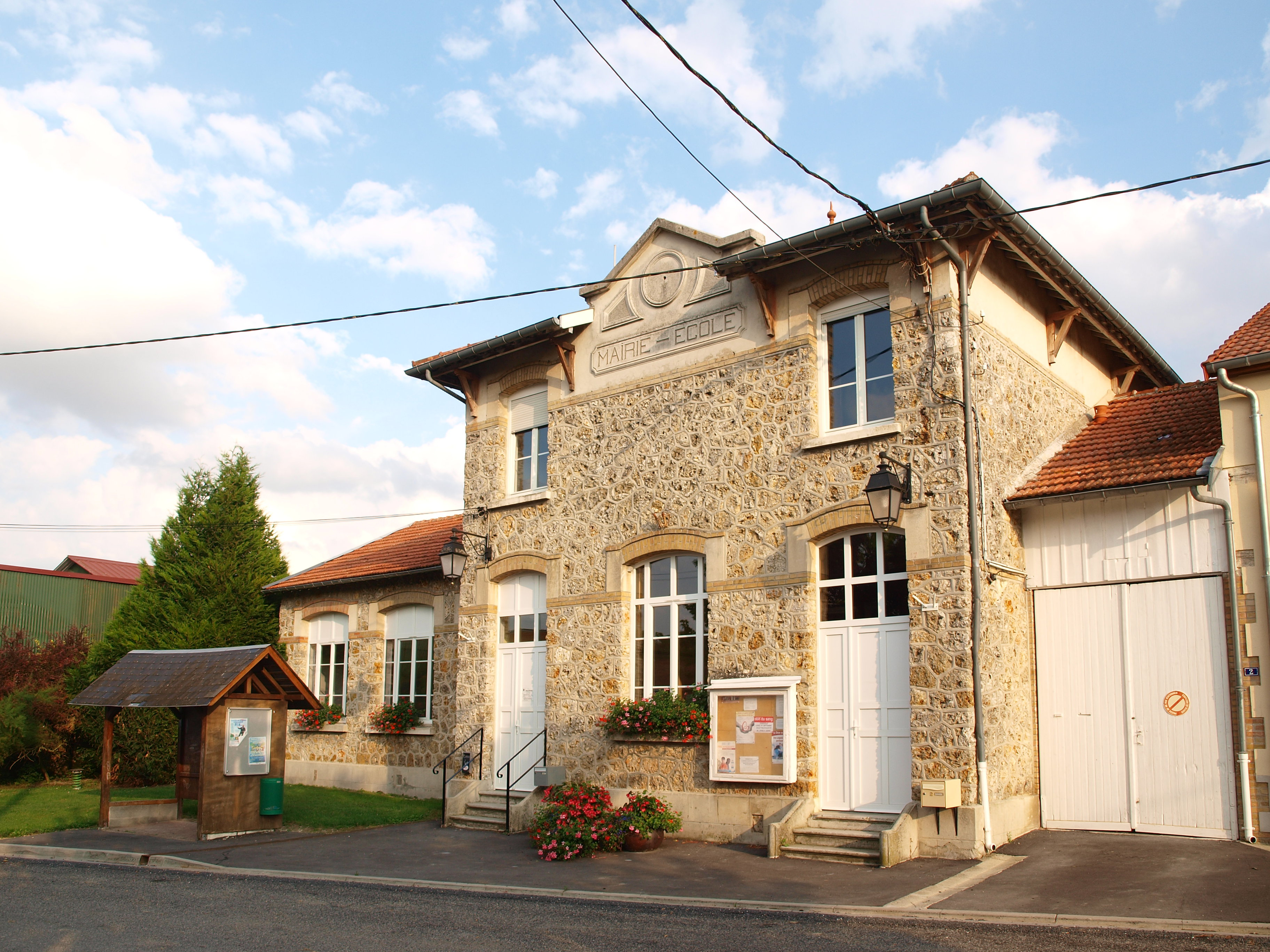 Aussonce (Ardennes, France) ; mairie